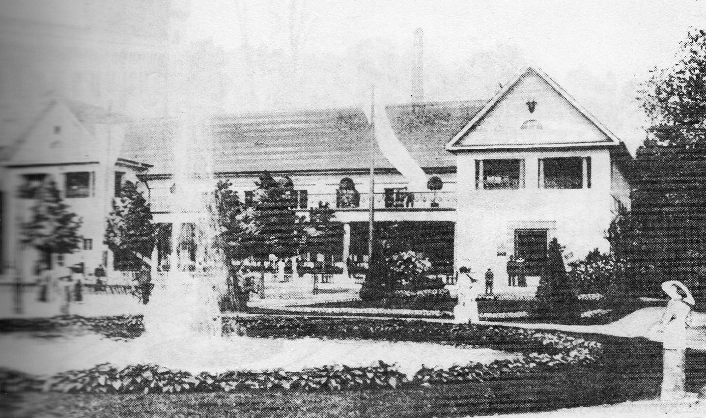 Tzw. Betonhaus podczas Wystawy Wschodnioniemieckiej w Poznaniu w 1911.